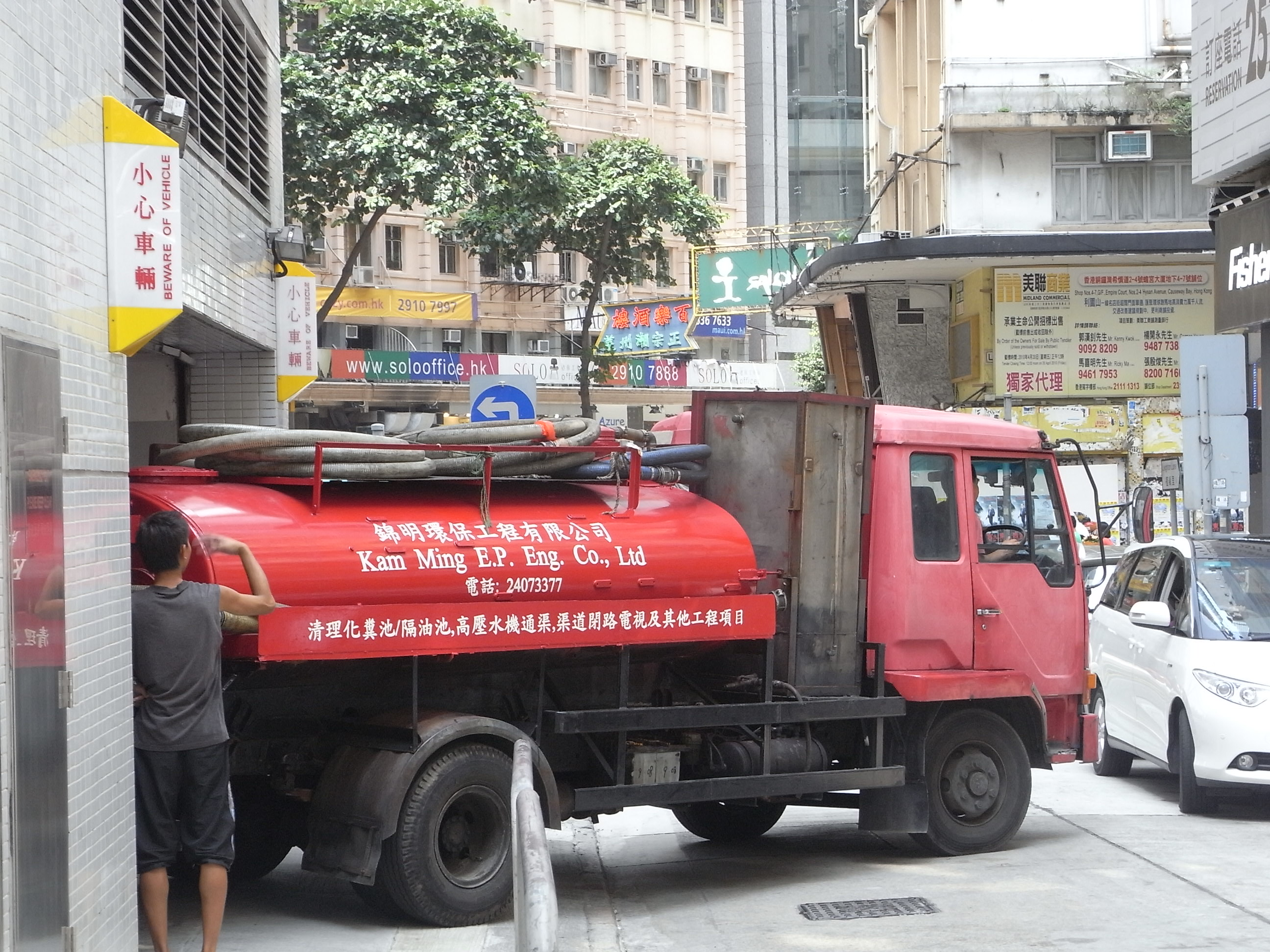 香港zh:銅鑼灣禮頓里